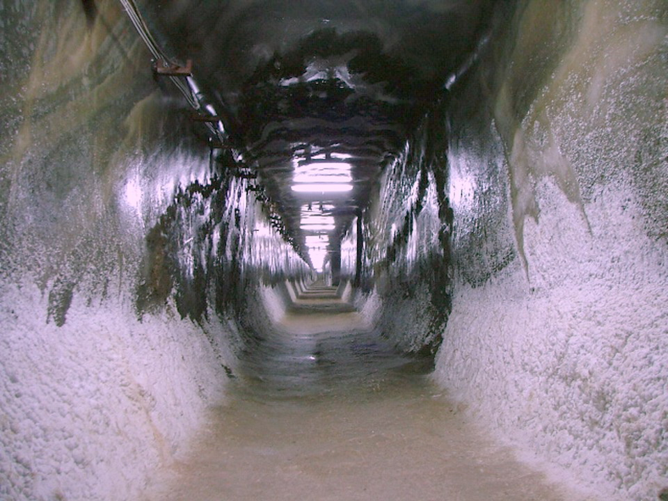 Salina Turda, galeria de acces Franz-Josef (porţiunea săpată în sare).